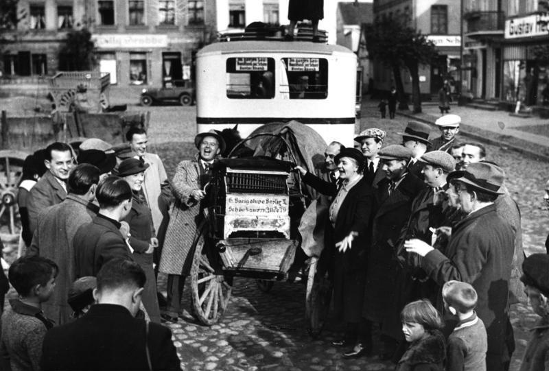 Oktober 1934 Mit dem Sender Königsberg durch Ostpreussen